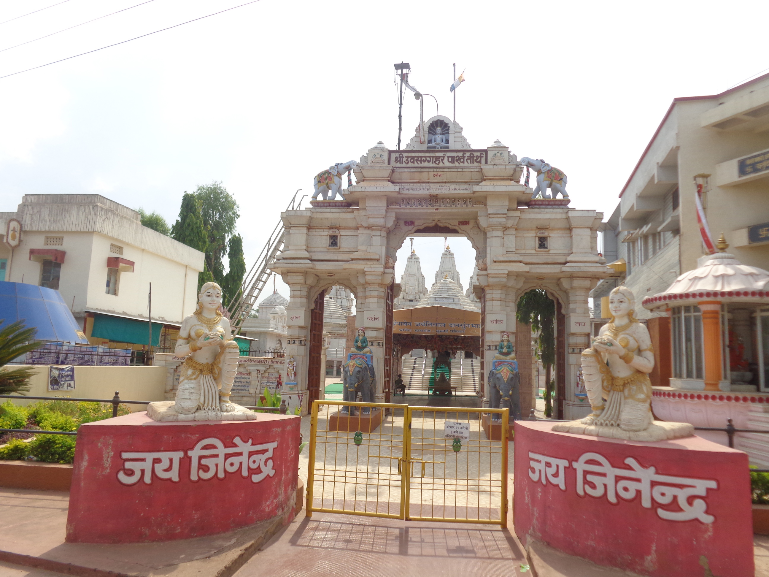 uwasaggaharam gate, nagpura, durg, chattisgarh